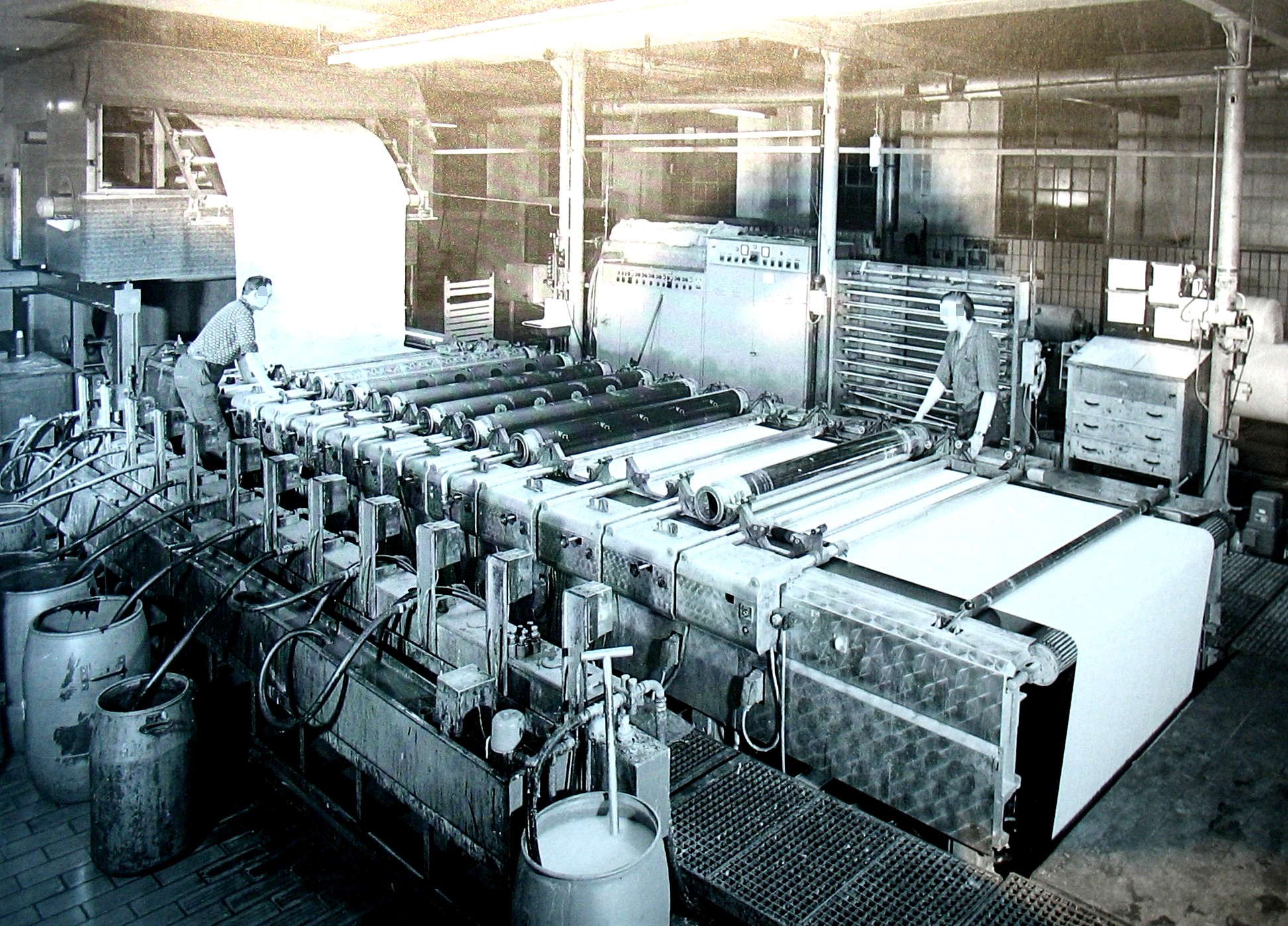 Rotationsdruckmaschine